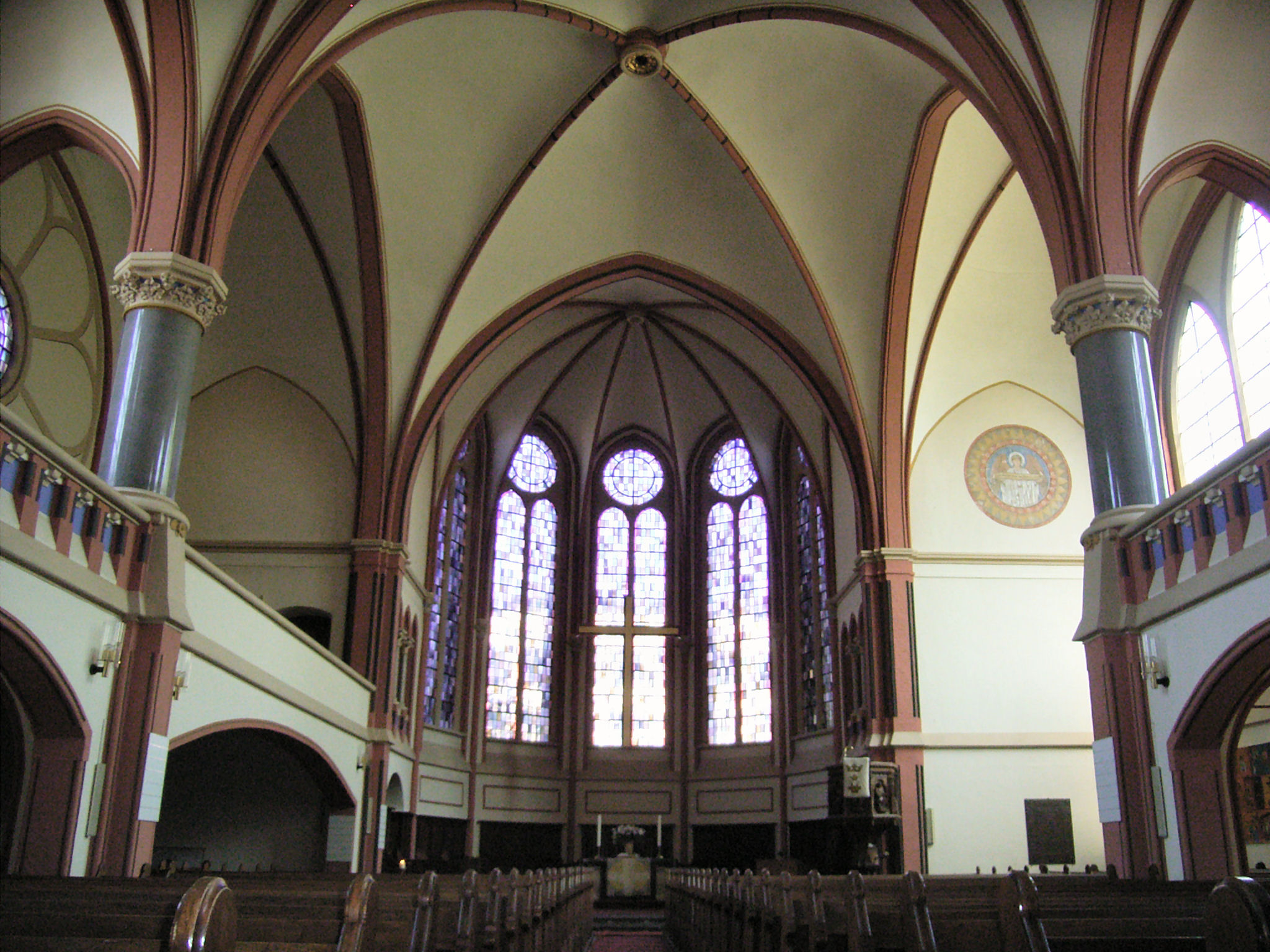 Neuwied Marktkirche innen